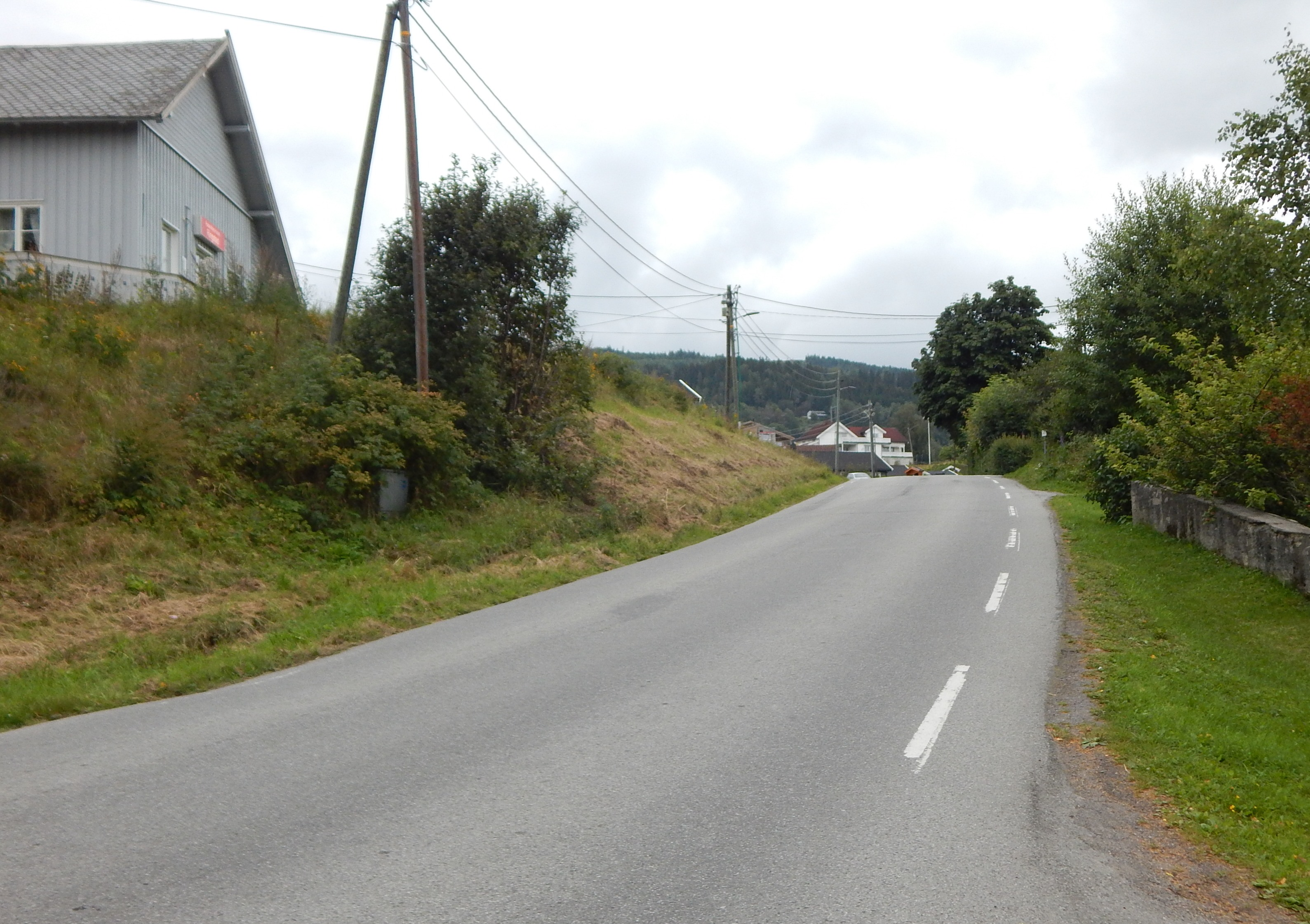 Lynnebakka (fylkesvei 2330, tidl. 56) nær vestenden mot FV2324